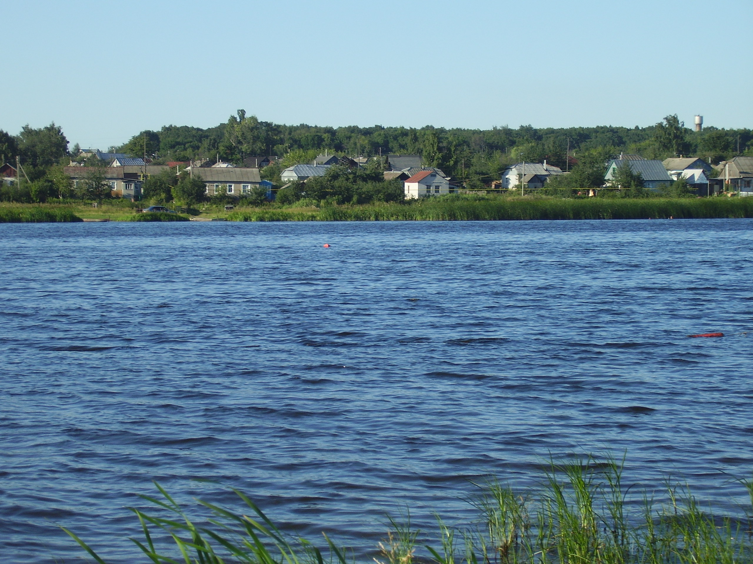 Река Матыра в городе Грязи